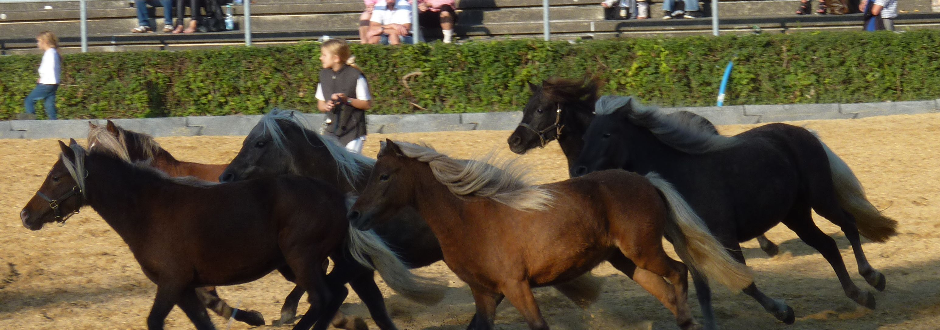 Vorführungen auf dem Landwirtschaftlichen Hauptfest 2014